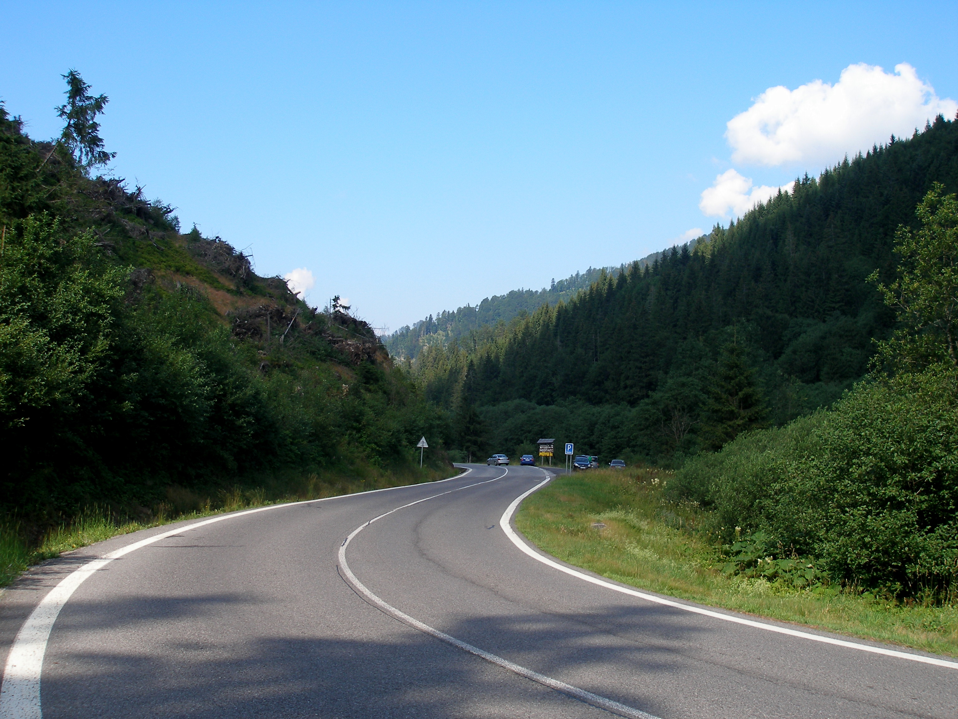 Turistické stredisko a horský priechod Čertovica. Nízke Tatry.